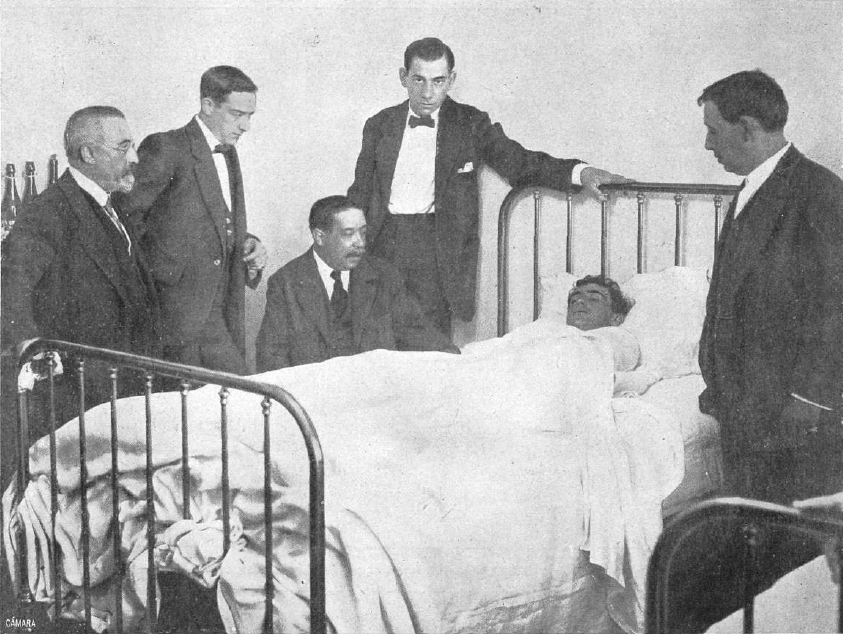 Fotografía publicada en 1914 que muestra al torero español Joselito en la cama de la habitación de un hotel tras haber sufrido una cogida en la plaza de Barcelona el día 5 de julio. A su lado aparecen miembros de su cuadrilla y, sentado, el senador Emilio Junoy.